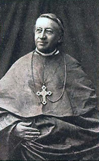 Kardinaal Goossens (1827-1906) - primaat van België (1884-1906) - aartsbisdom Mechelen - België